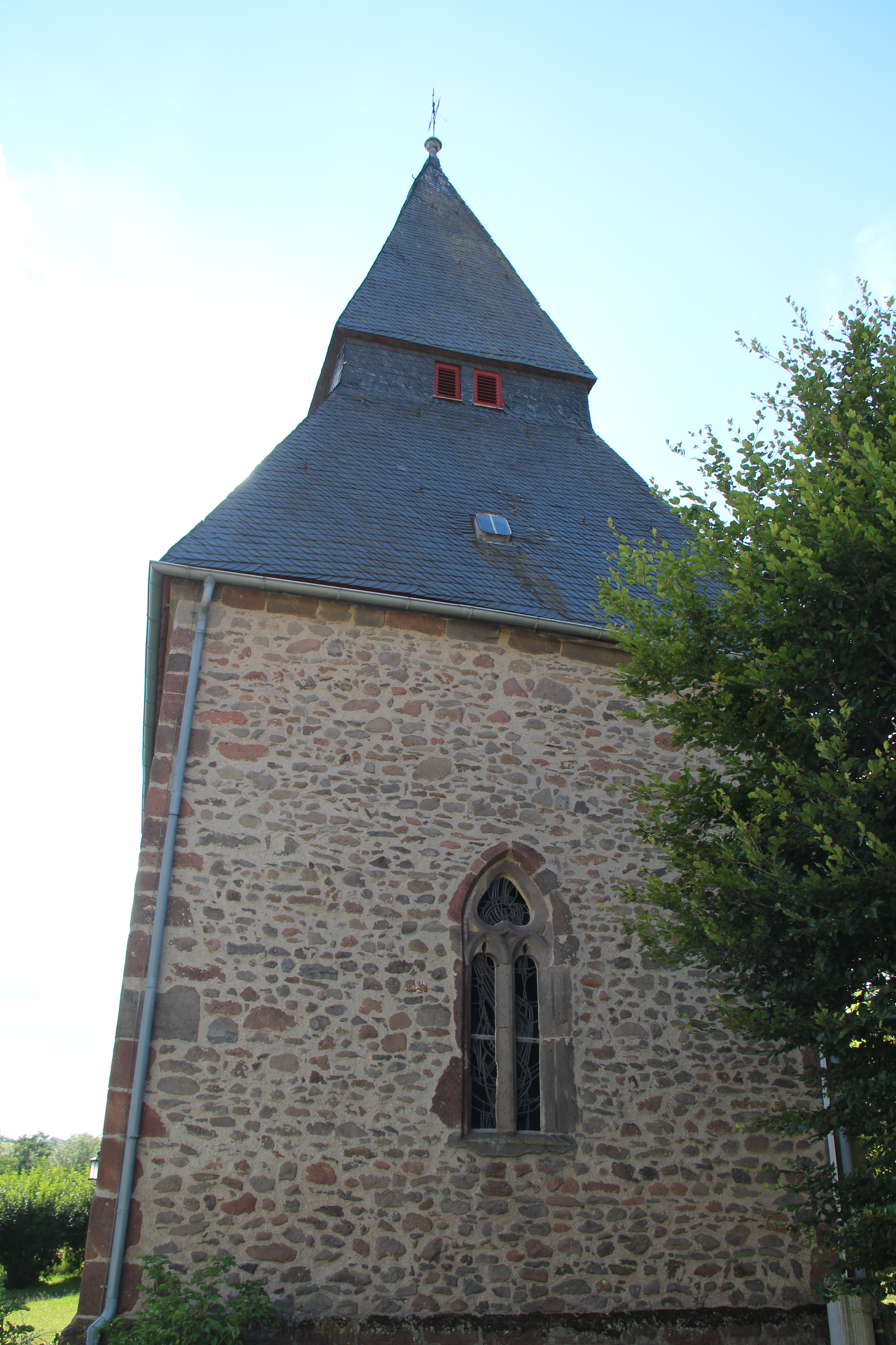 Ostseite des Turms der Kirche von Odenhausen (Lumda), Kreis Gießen, Hessen, Deutschland